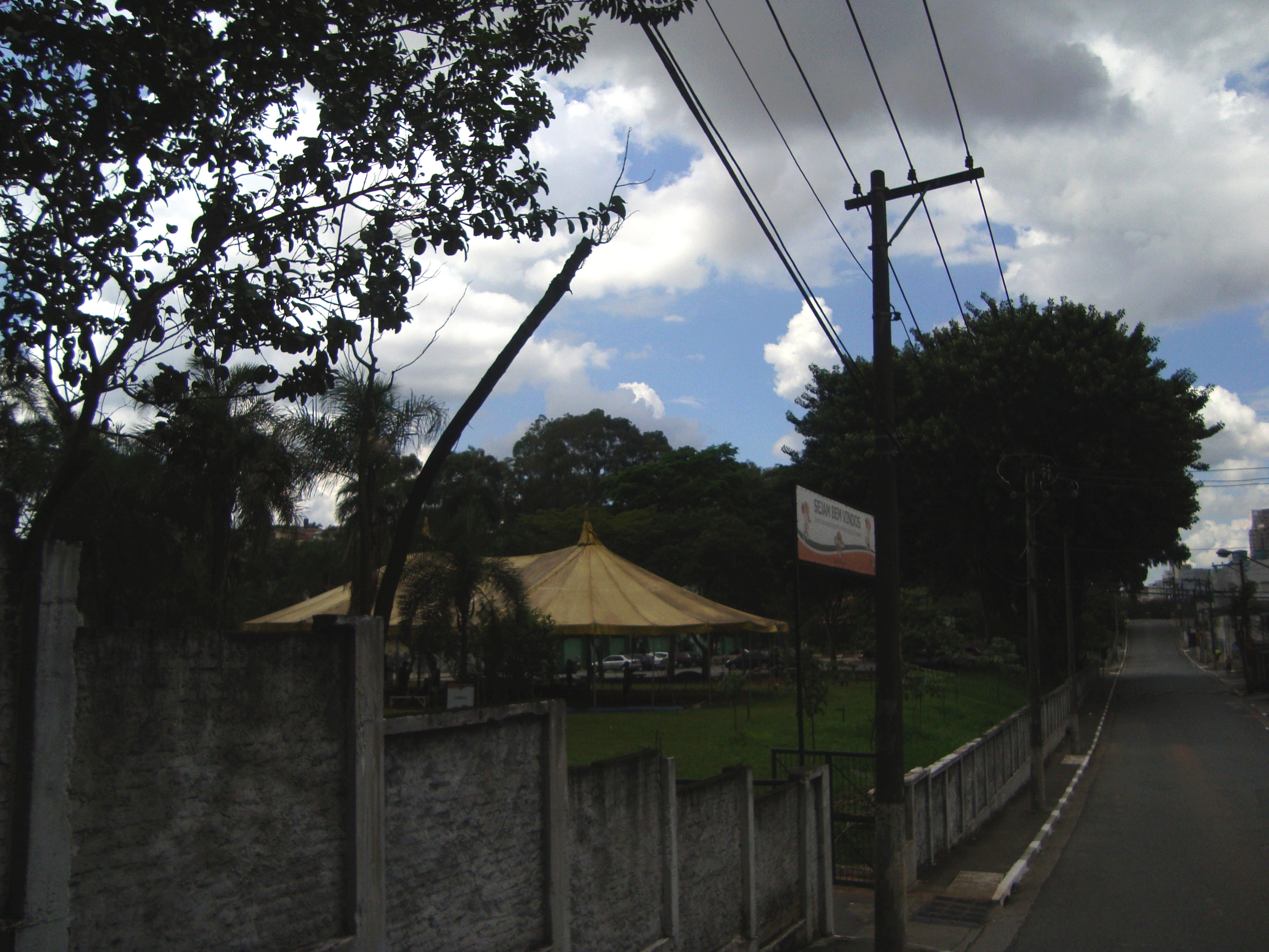 Foto da fachada do Clube Escola Jardim São Paulo, no bairro homônimo, zona norte de São Paulo.